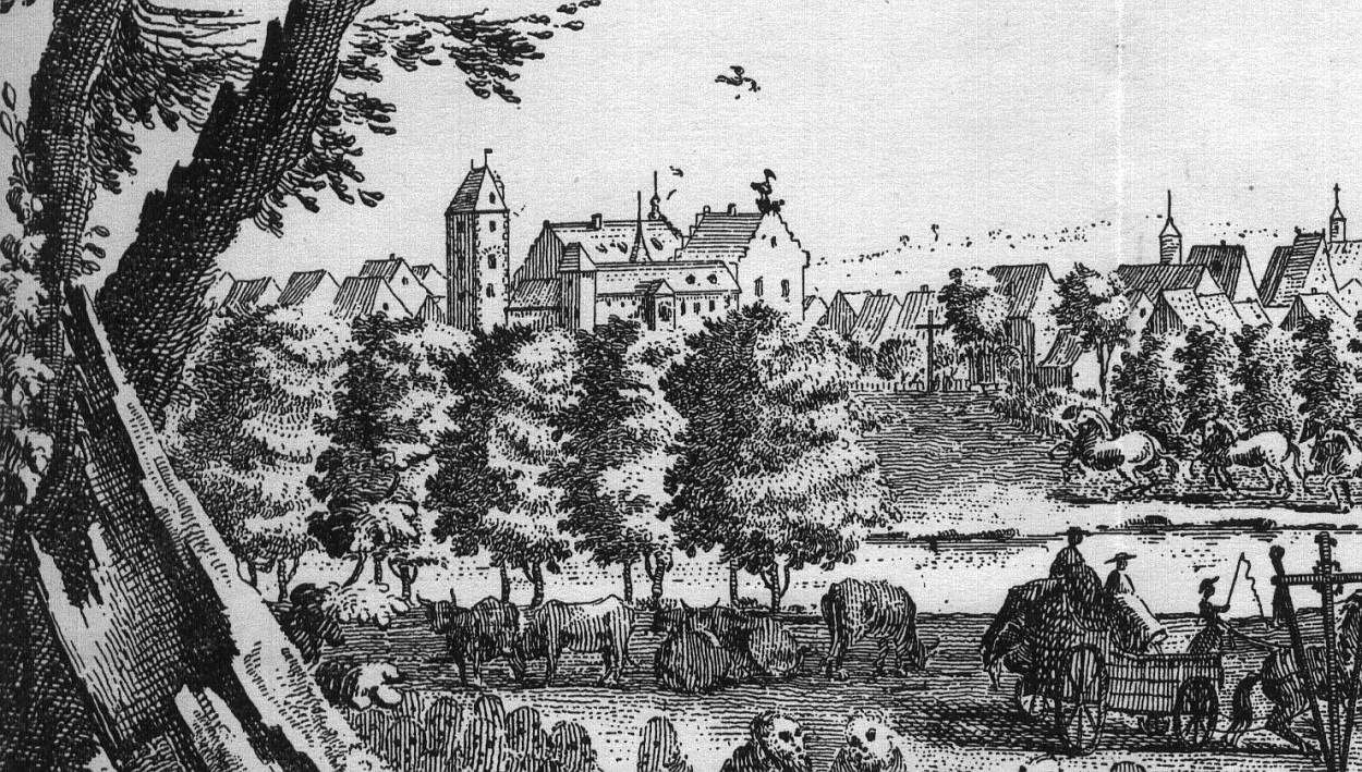 Schloss Dieburg, Ausschnitt aus dem Kupferstich von B. Roque